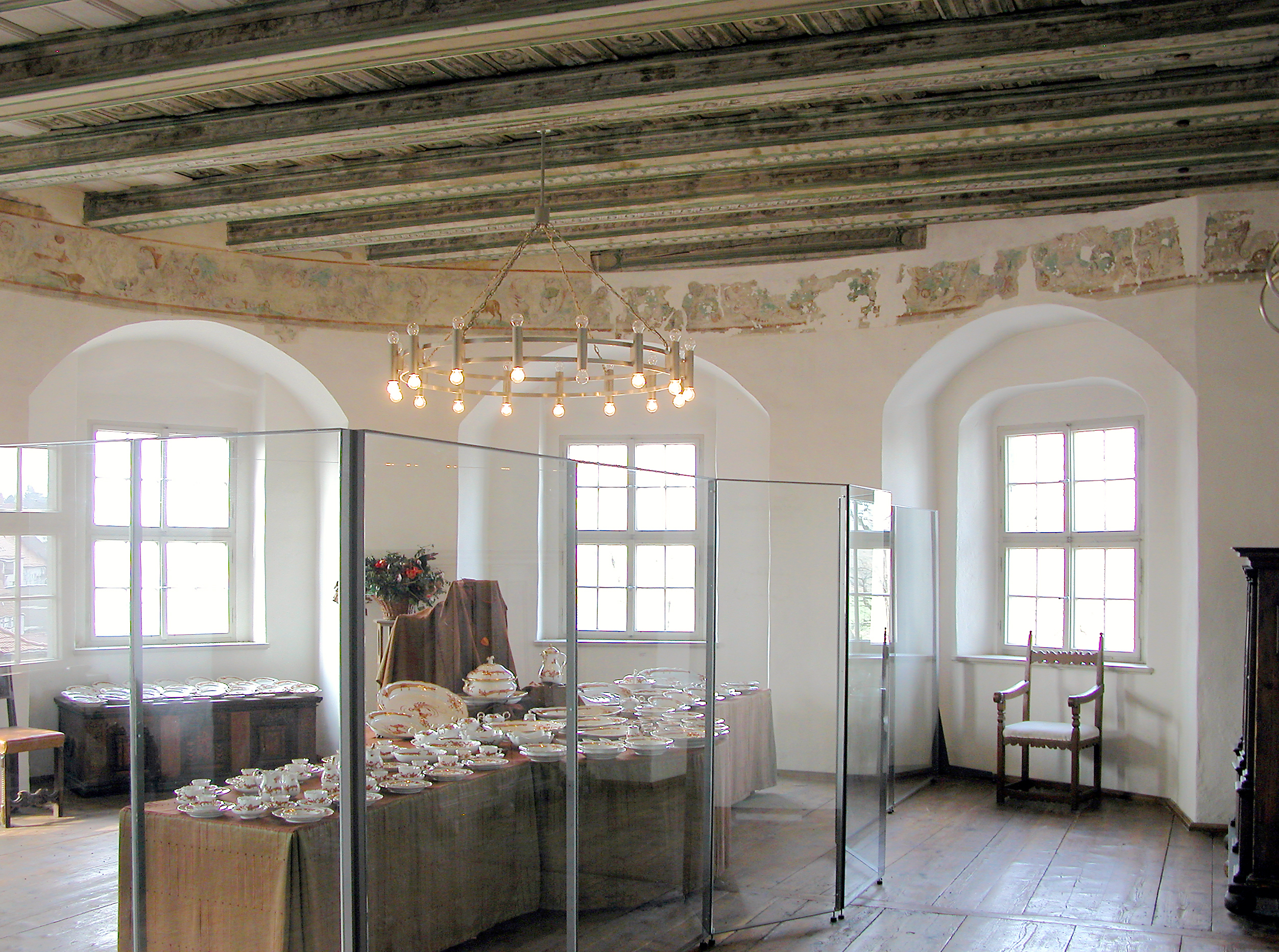 30.03.2007 01683 Nossen: Schloß. 1. OG Westflügel. Kürfürstenzimmer bzw. Brandenburgische Stube. [DSCN21739.TIF]20070330160DR.JPG(c)Blobelt